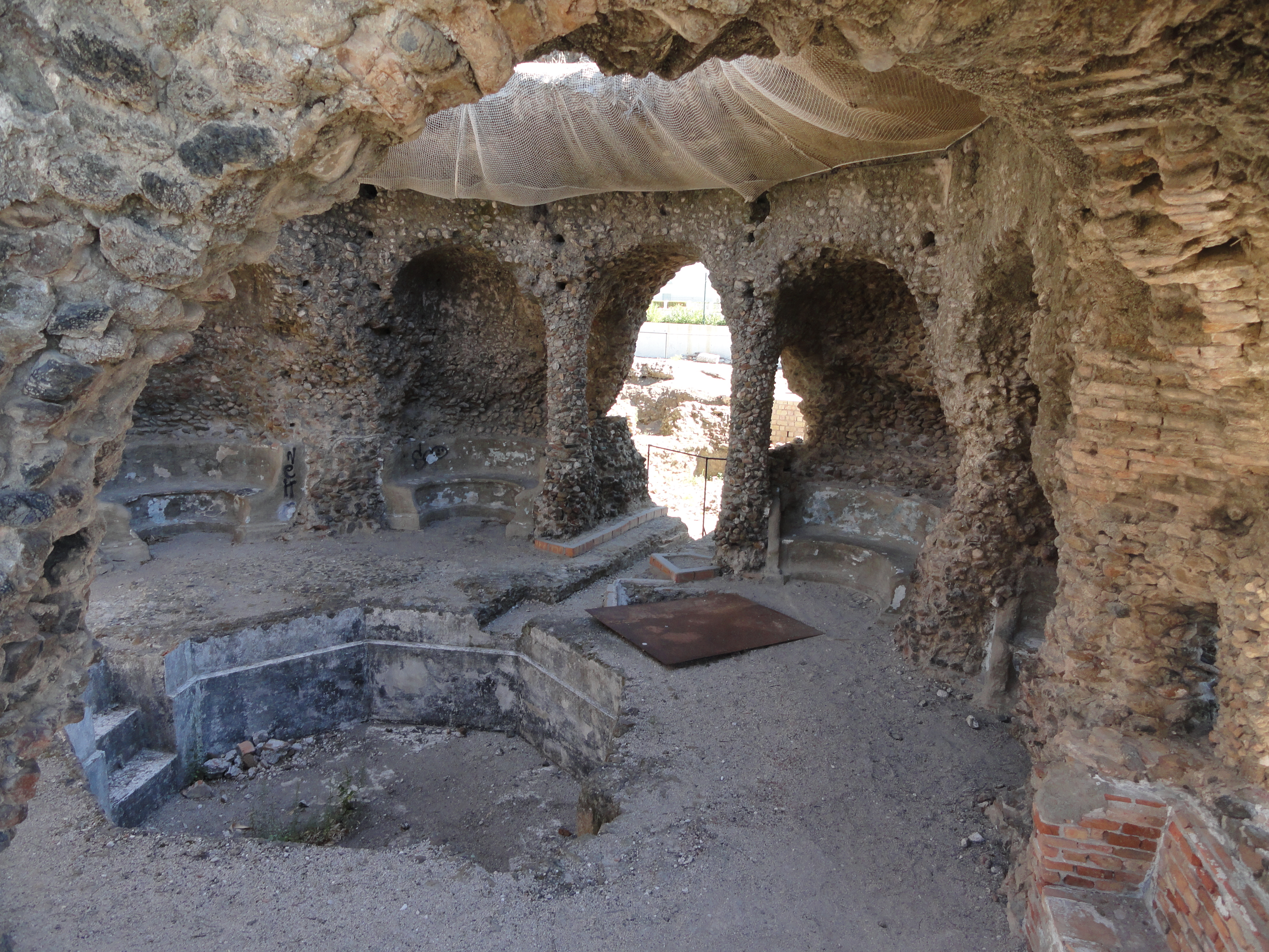 Termas romanas de las Bóvedas